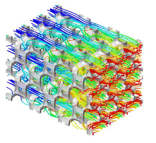 Transfert thermique à travers une mousse régulière